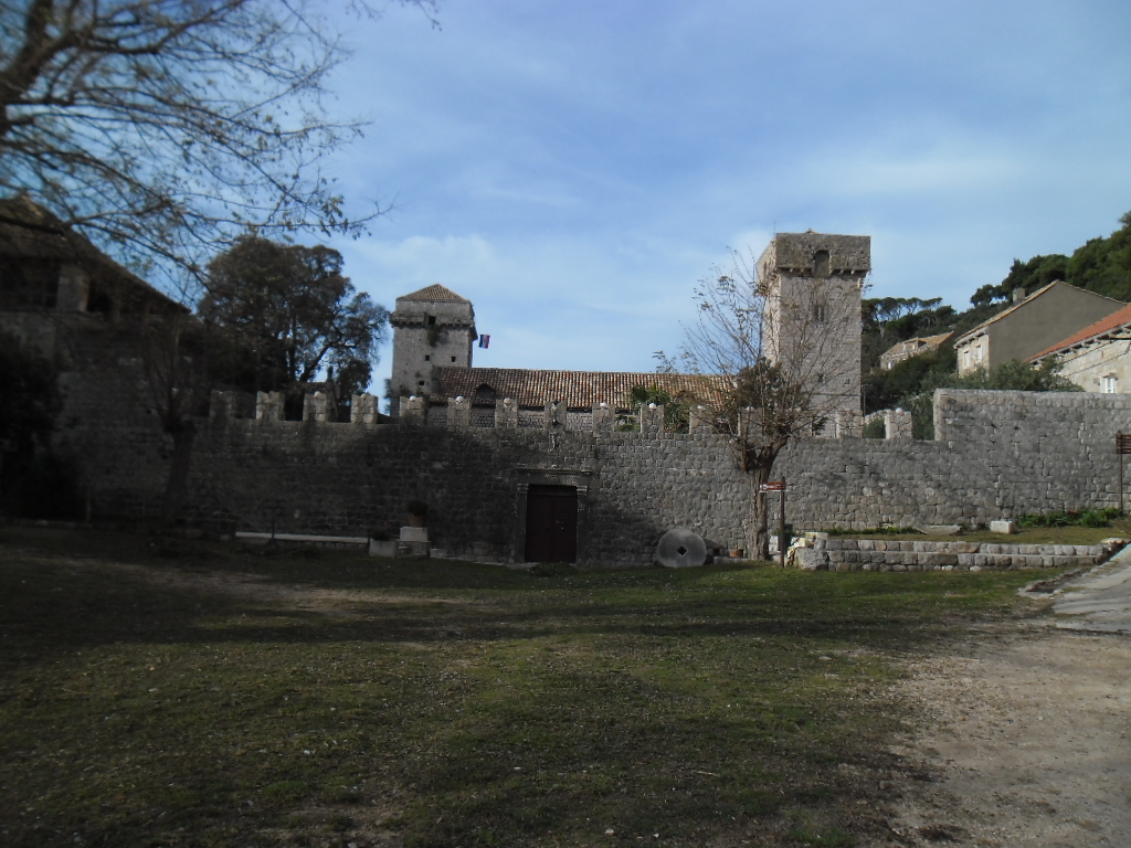 ljetnikovac Skočibuha u Suđurađu na otoku Šipanu